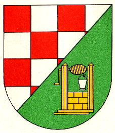 Wappen von Rinzenberg